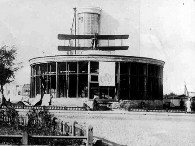 Здание клуба комплекса «Дом обороны» (фото 1936 г.)